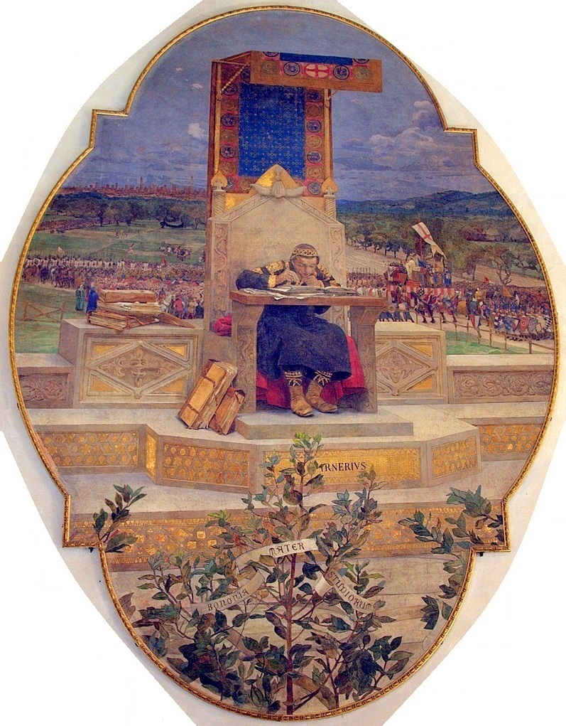 Luigi Serra: Irnerio che glossa le antiche leggi (Palazzo D'Accursio, Bologna)